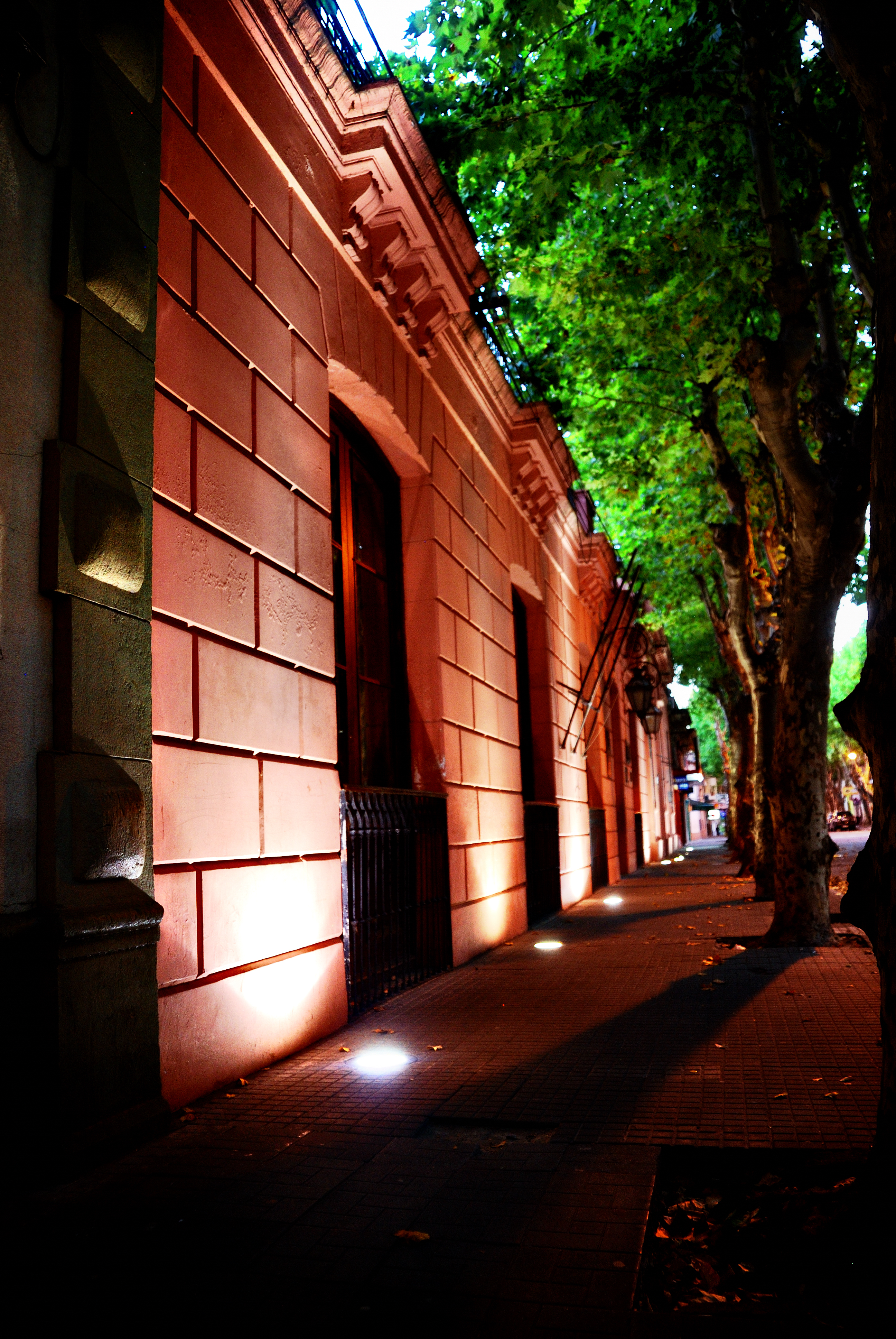 Casa en que vivió Fructuoso Rivera y casa de gobierno. Ubicada en el departamento de Durazno